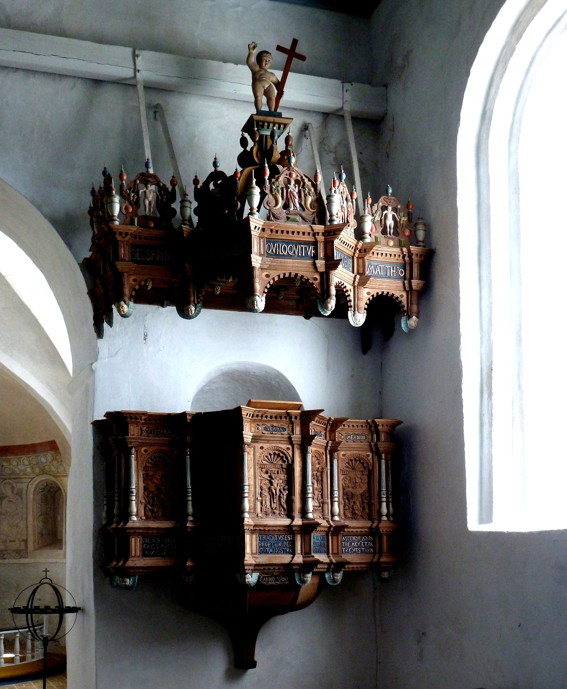 Kanzel der Kirche zu Ballum in Südjütland, Dänemark. Aufnahmedatum 2011-05.